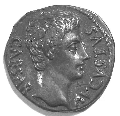 Silber-Denar des Augustus